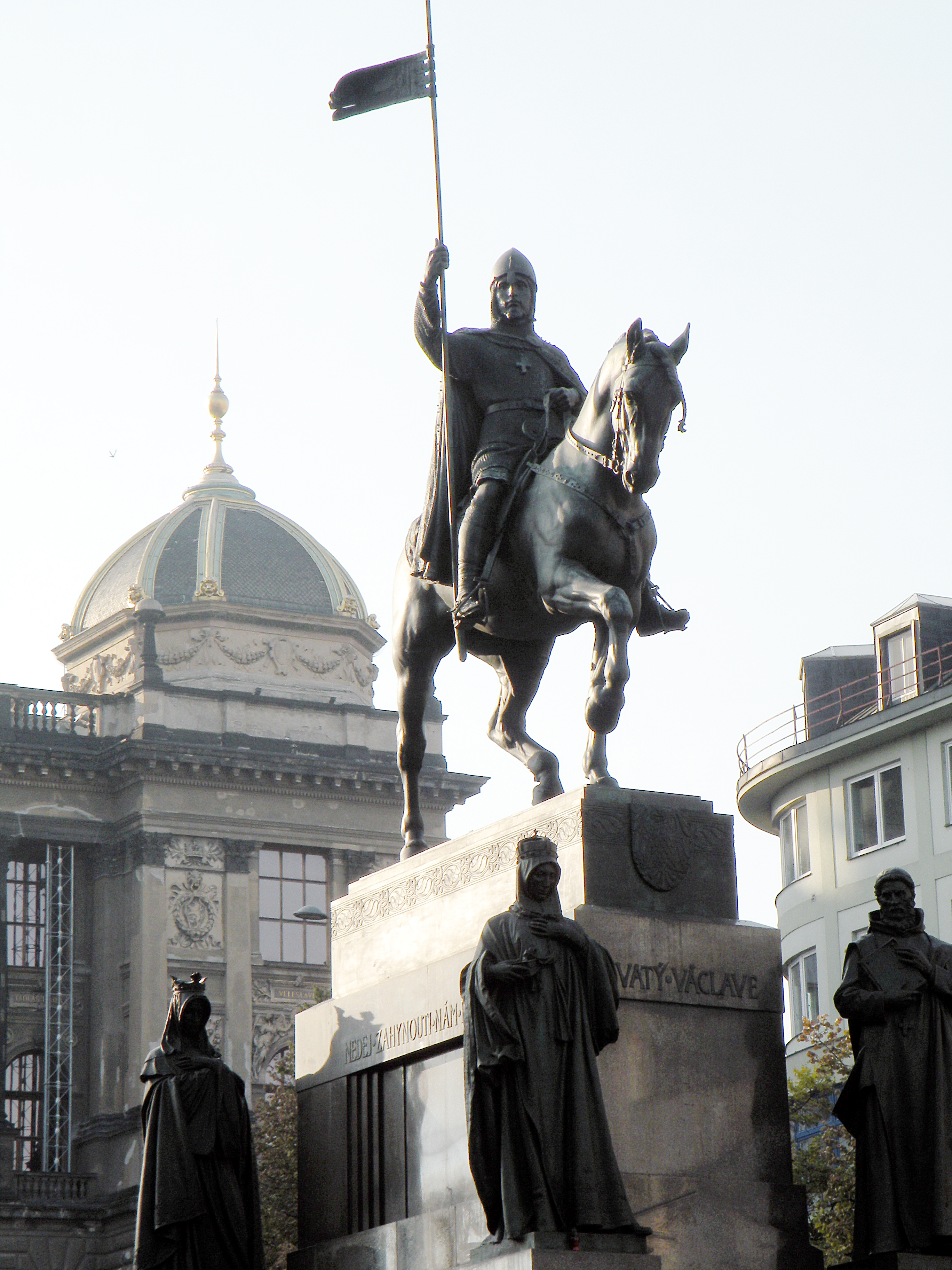 Pomník svatého Václava na Václavském náměstí v Praze